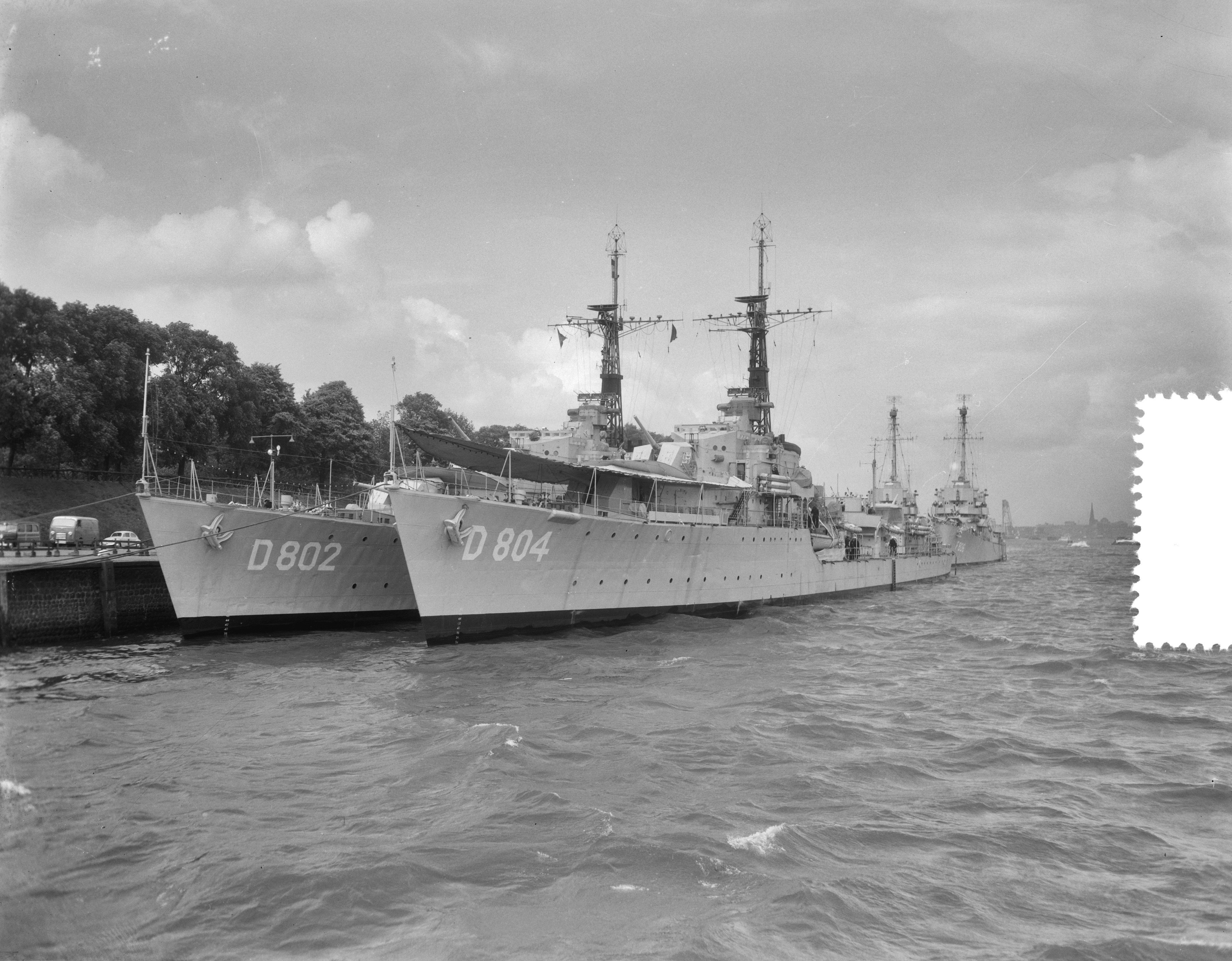 Collectie / Archief : Fotocollectie Anefo Reportage / Serie : [ onbekend ] Beschrijving : Hr. Ms. Kortenaer (D 804) en Hr. Ms. Evertsen (D 802) Datum : ongedateerd Locatie : Rotterdam, Zuid-Holland Trefwoorden : marine, militaire vaartuigen, vlootschouwen Instellingsnaam : HM Kortenaer Fotograaf : Fotograaf Onbekend / Anefo, [onbekend] Auteursrechthebbende : Nationaal Archief Materiaalsoort : Negatief (zwart/wit) Nummer archiefinventaris : bekijk toegang 2.24.01.04 Bestanddeelnummer : 906-5213